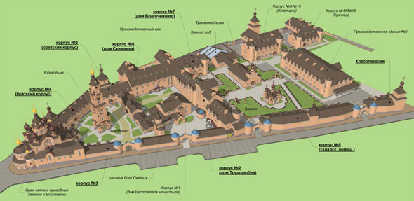 Схема Свято-Захарии-Елисаветинского скита